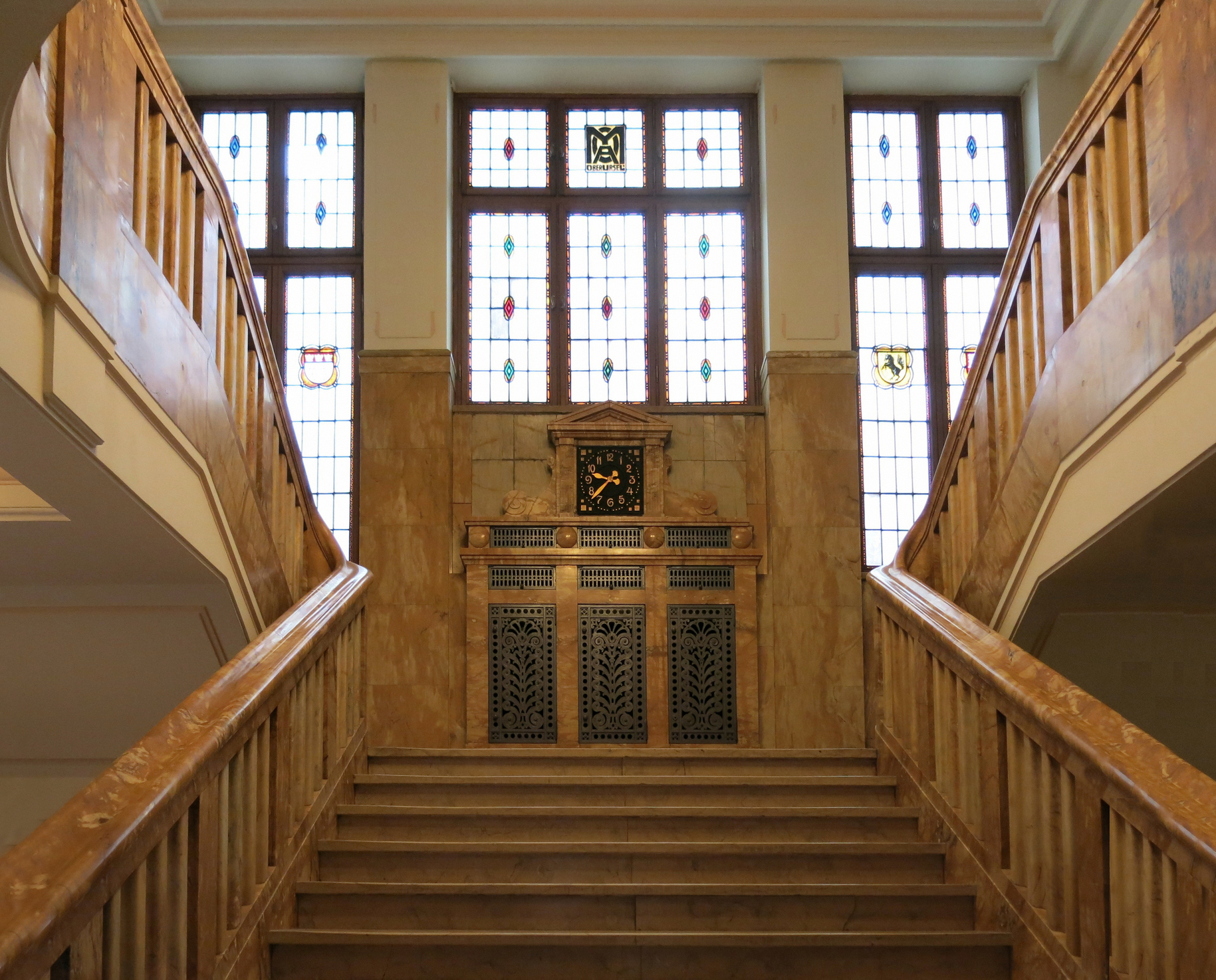 Verwaltungsgeb. Marmortreppenhaus, Glaswand mit Wappen